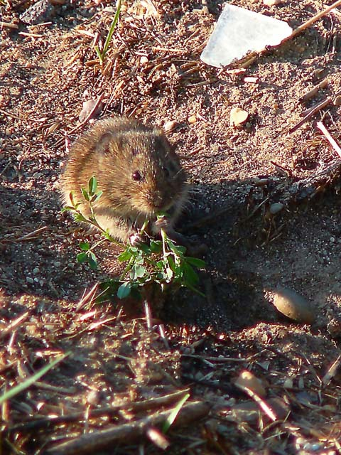 Microtus arvalis asturianus